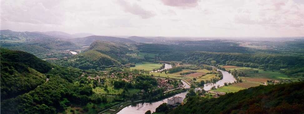 La vallée du Doubs à Avanne-Aveney , vue depuis le fort de Planoise